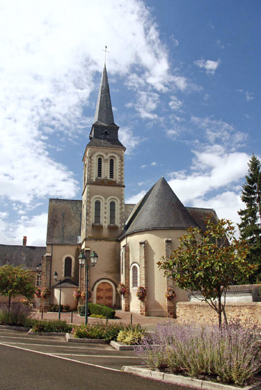 Entrammes (Mayenne) - Eglise St Etienne